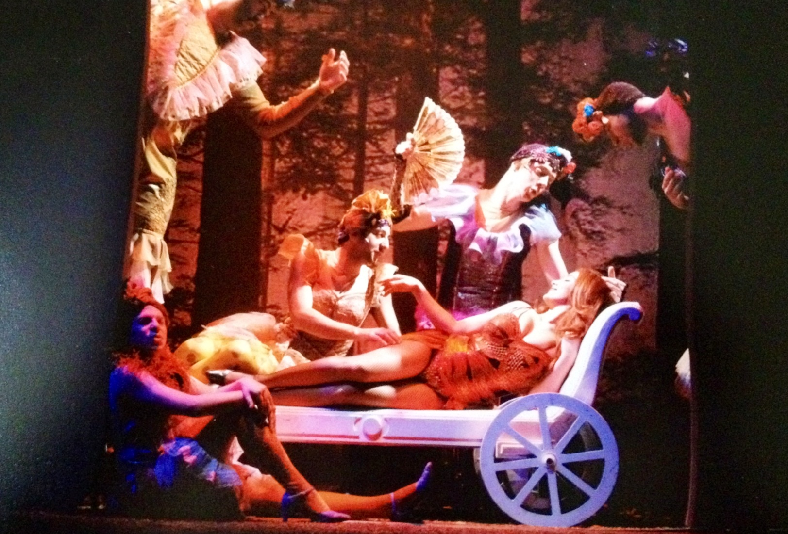 ההצגה חלום של לילה בליל קיץ, בבימויו של גלעד קמחי, עיצוב תלבושות אולה שבצוב, עיצוב תפאורה ערן עצמון, עיצוב תאורה יחיאל אורגל, בית ליסין, 2009